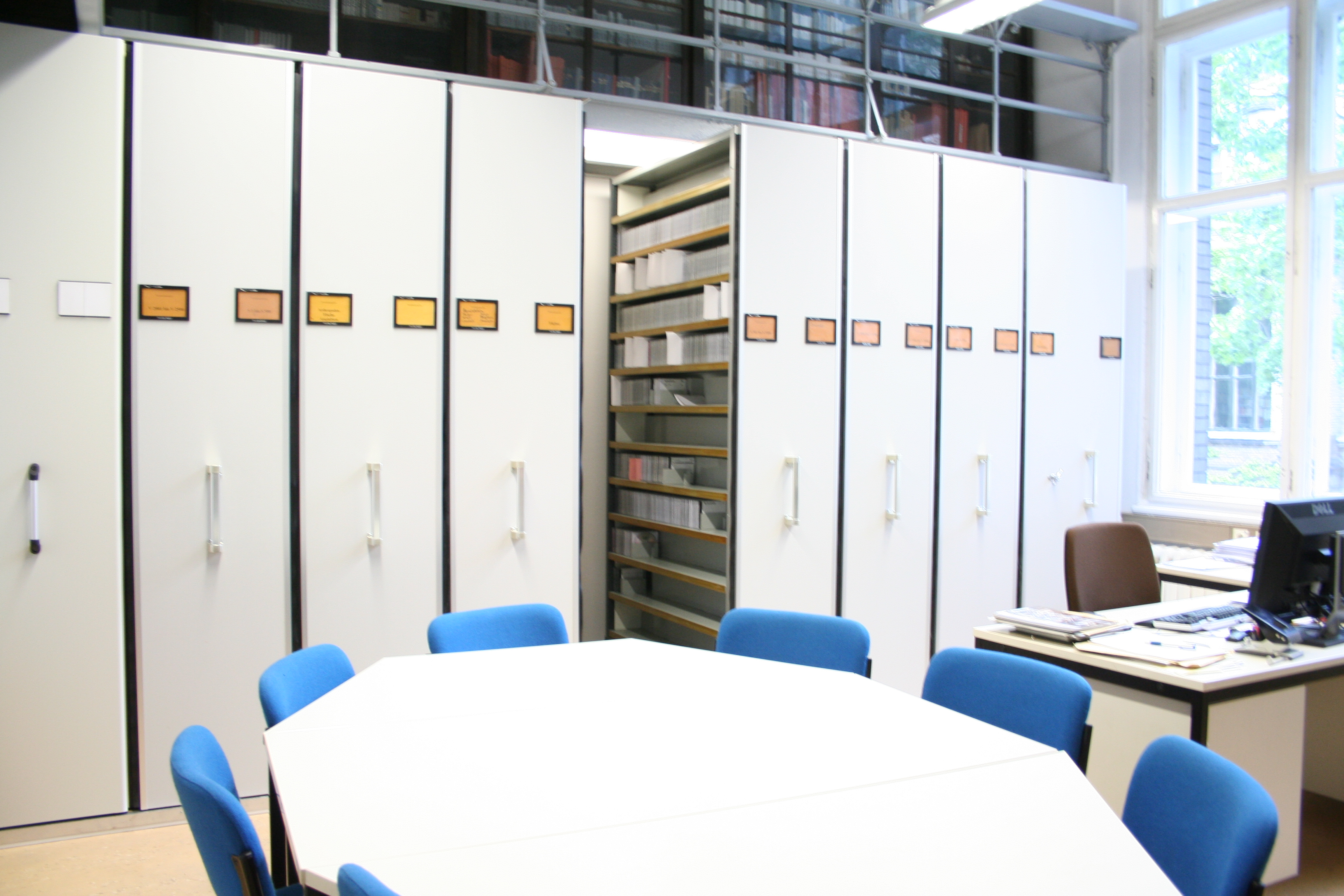 Tierstimmenarchive Naturkundemuseum Berlin